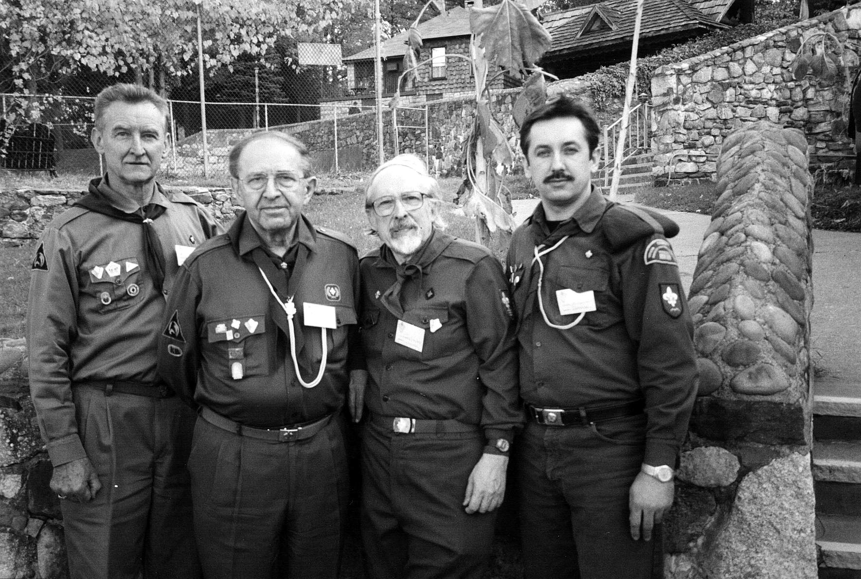 Митропольна стежа